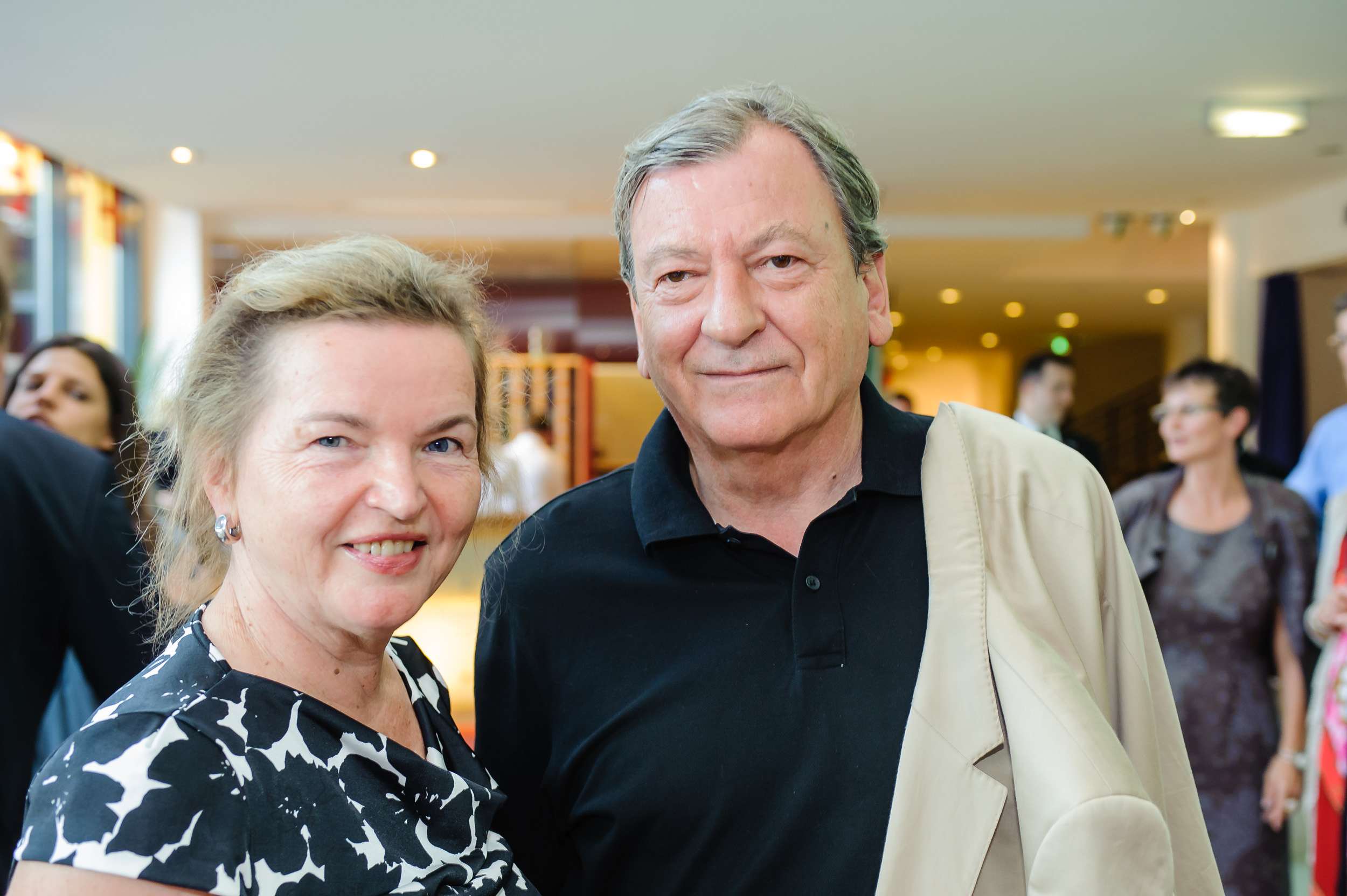 "Kanzlerfest" - 3.8.2013 Gartenhotel Altmannsdorf Foto: Thomas Lehmann